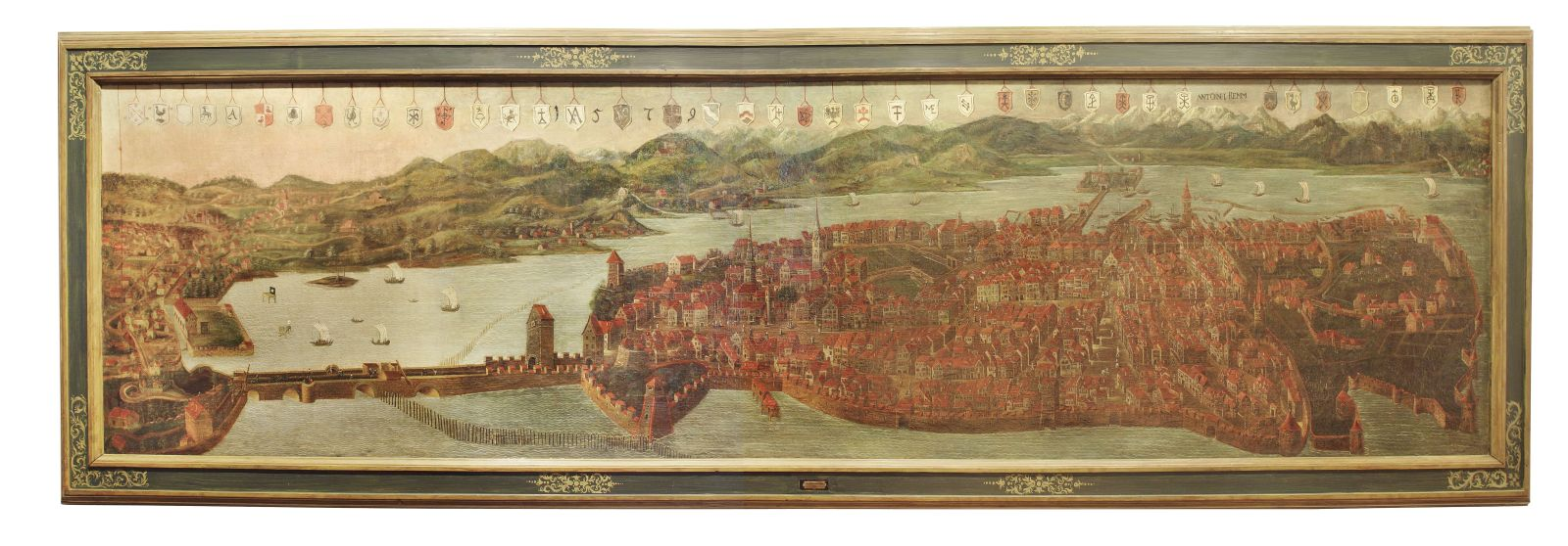 Ansicht Lindau im Bodensee (1579)